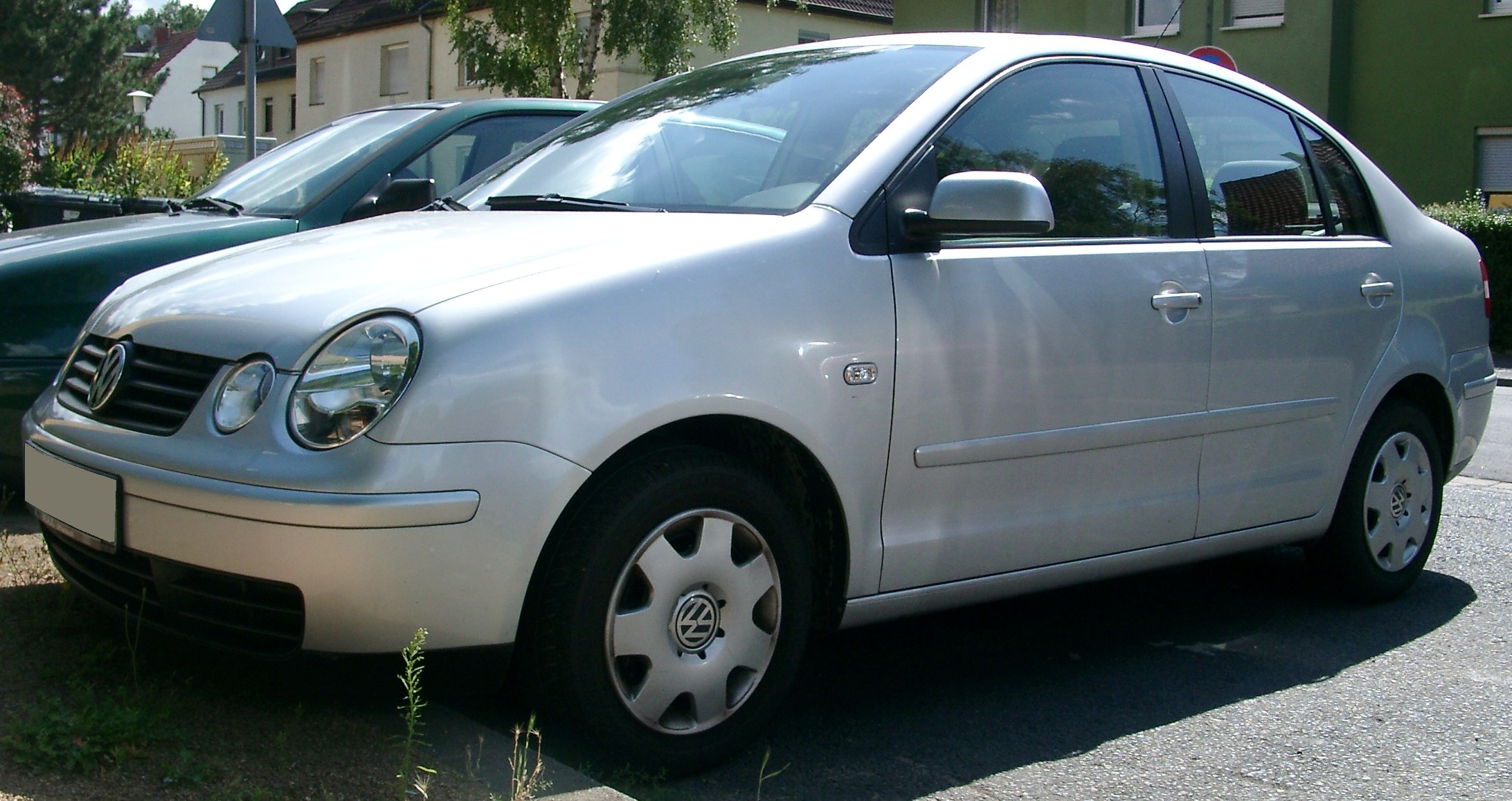 VW Polo IV Limousine